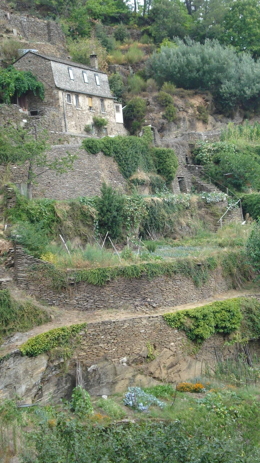 Des bancels ou restanques aux calquières, st Germain de Calberte Lozère